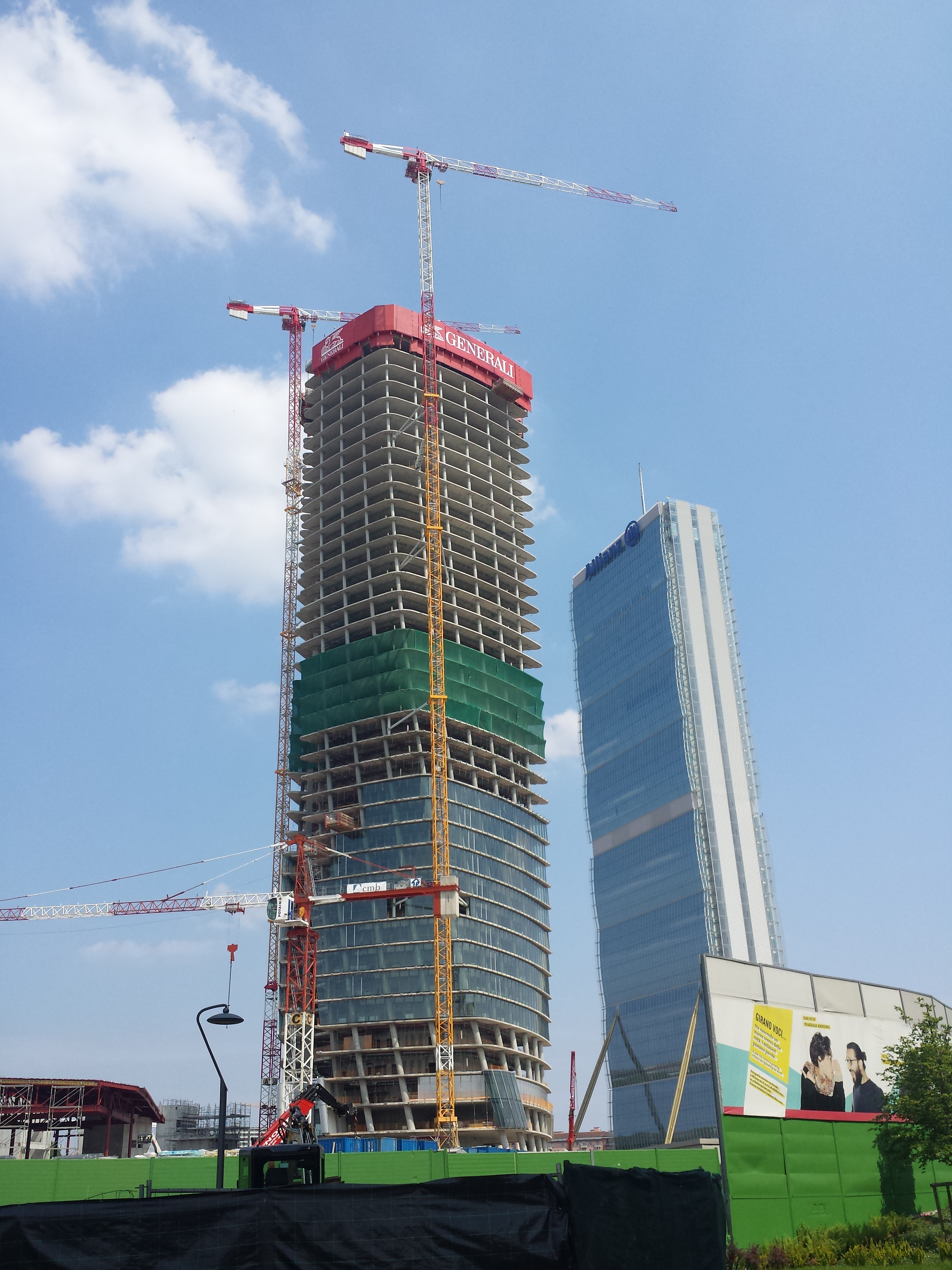 La torre Hadid in costruzione fotografata dai giardini Citylife